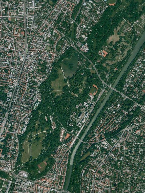 Luftaufnahme der Bayerischen Vermessungsverwaltung des Englischen Gartens in München, Bayern (Befliegungsdatum: 26.05.2012. Bildflug-Nr.: 112013)